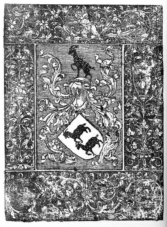 Armas de Garcia de Resende